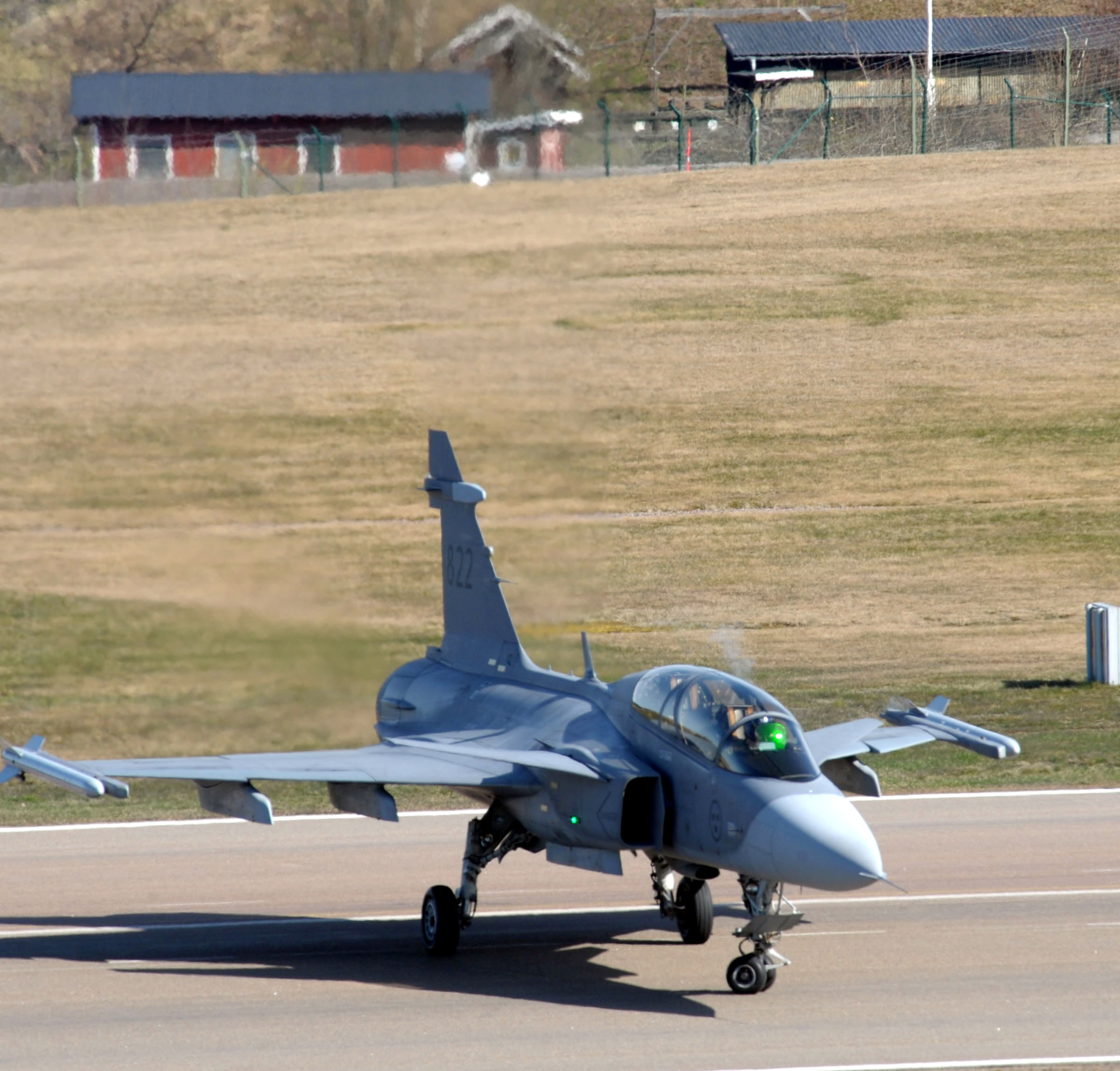 03/04/2014, Suécia Fotos: Jorge Cardoso